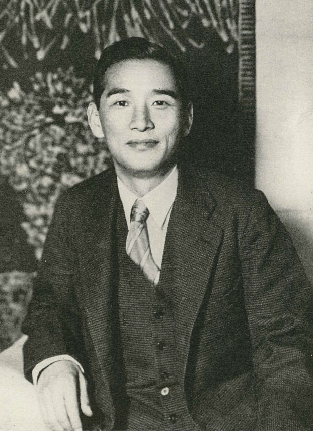 Portrait of Yachiyo Manabe(真鍋八千代 1894-1975)